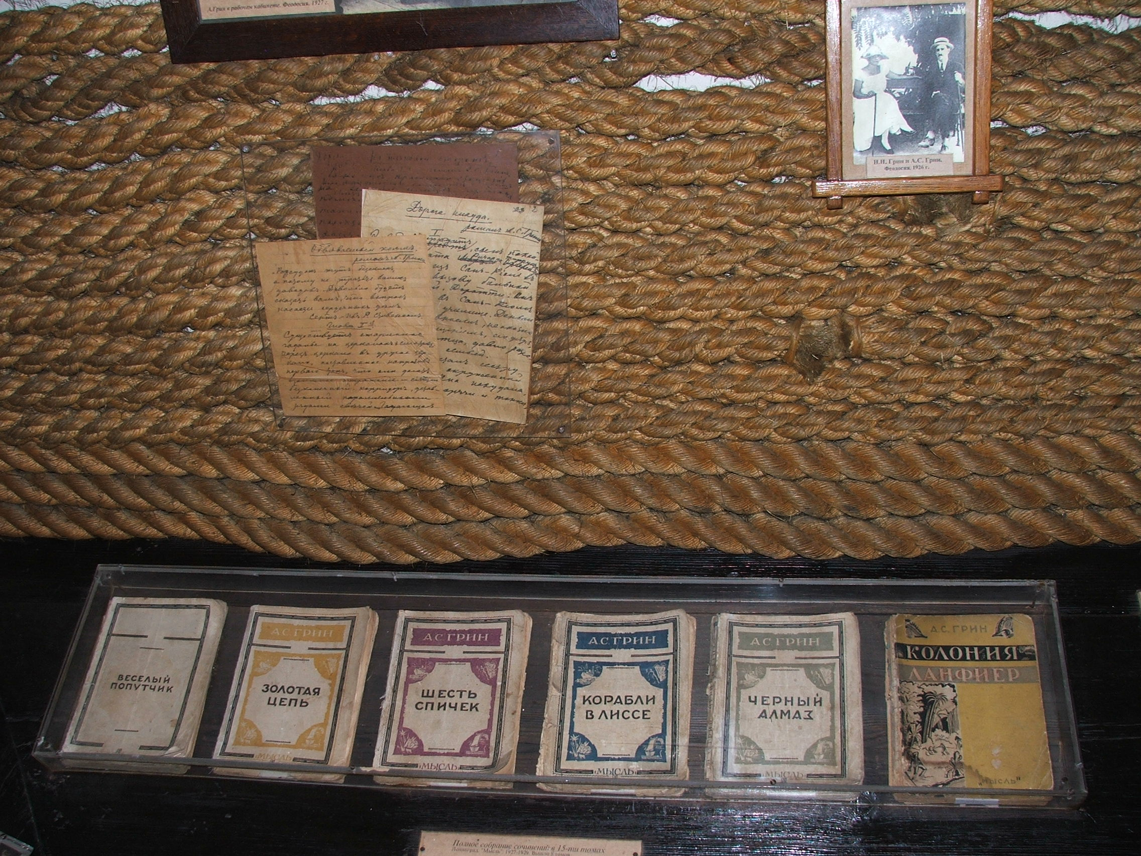 Будинок-музей О. С. Гріна, Феодосія, вул. Галерейна, 8–10, літ. А, А1, Б